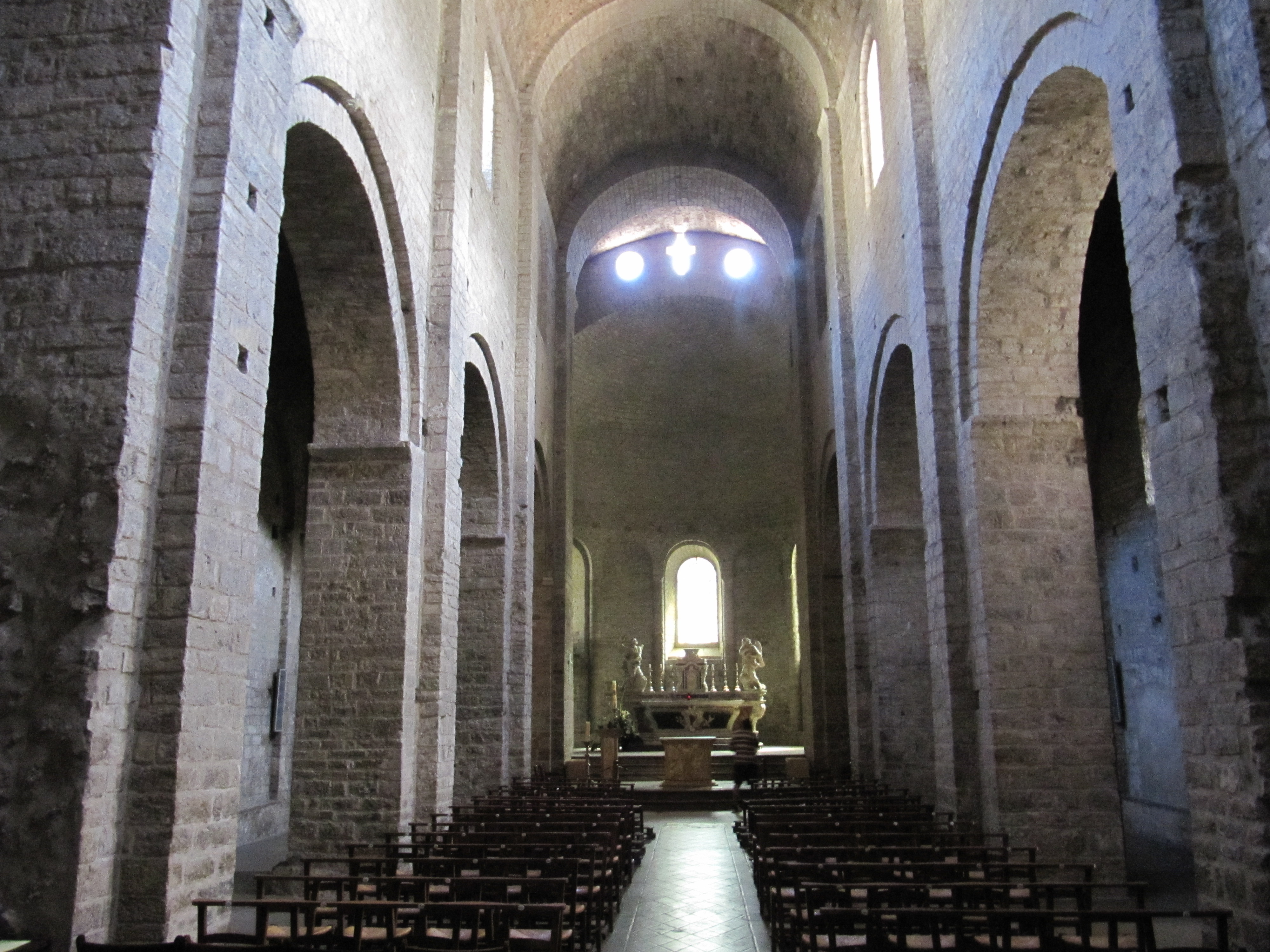 Intérieur de l'Abbaye de Saint-Guilhem-le-Désert This building is en partie classé, en partie inscrit au titre des Monuments Historiques. .